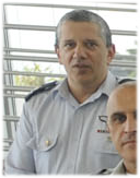 January 10, 2011 Today, the IDF Chief of Staff, Lt. Gen. Gabi Ashkenazi, as well as members of the General Staff, parted with the outgoing Director of the Mossad Intelligence Agency, Maj. Gen (res.) Meir Dagan in a celebratory lunch at the Rabin base in Tel Aviv. The Chief of Staff thanked the outgoing Mossad Director for his combined effort and said, "During the past eight years, as head of the Mossad, you were on the forefront of achievement. You led the agency during a unique and challenging period and contributed exceptionally, with most of your achievements unknown. Over the eight years we've worked together collaboratively and with the mutual understanding that we are working towards a shared and higher goal--the security of the State of Israel." The outgoing Director thanked the Chief of Staff for the years of cooperation and wished him and the General Staff luck in the rest of their endeavors. Pictured: The General Staff with Maj. Gen. (res.) Meir Dagan Photography: Cpl. Ori Shifrin, IDF Spokesperson's Unit * הרמטכ"ל, רא"ל אשכנזי, וחברי פורום המטה הכללי נפרדו היום (ב') מראש המוסד היוצא, אלוף (במיל') מאיר דגן, בארוחת צהריים חגיגית בבסיס רבין בת"א. הרמטכ"ל הודה לראש המוסד היוצא על העבודה המשותפת ואמר כי "בשמונה השנים האחרונות, כראש המוסד, היית בחזית העשייה, הובלת את הארגון בתקופה מיוחדת ומאתגרת ותרמת תרומה ייחודית שרובה לא ידועה. בשנים האחרונות עבדנו יחד בשיתוף פעולה ומתוך הבנה שאנחנו משרתים מטרה משותפת ועליונה- ביטחונה של מדינת ישראל". ראש המוסד היוצא הודה לרמטכ"ל על שיתוף הפעולה ואיחל לו ולחברי פורום מטכ"ל הצלחה בהמשך העשייה החשובה. בתמונה: פורום מטכ"ל והאלוף (מיל') דגן. צילום: רב"ט אורי שיפרין, דובר צה"ל